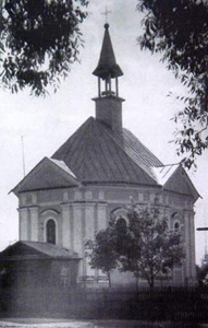 Касцёл Узвышэння Св. Крыжа ў Івацэвічах